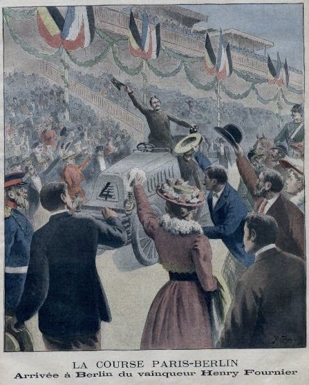 Arrivée à Berlin d'Henri Fournier sur Mors - Le Petit Journal supplément illustré du 14 juillet 1901